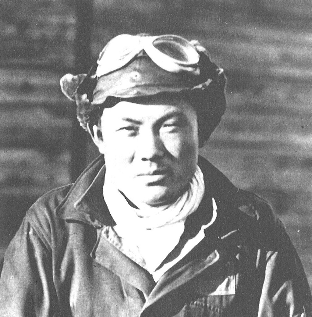 1945年初めごろ、343空戦闘301所属時代の撮影